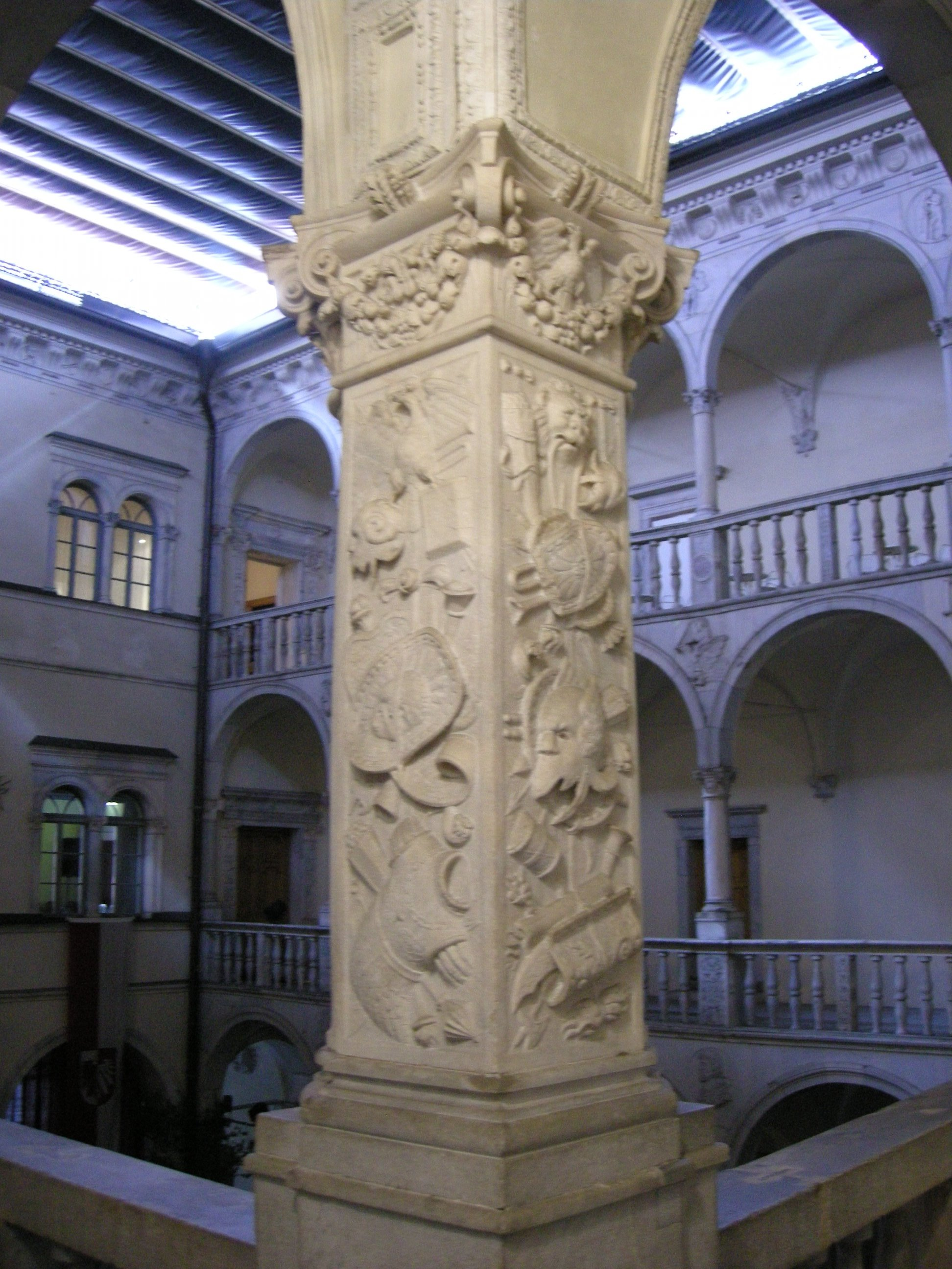 Spittal an der drau, schloss porcia, cortile